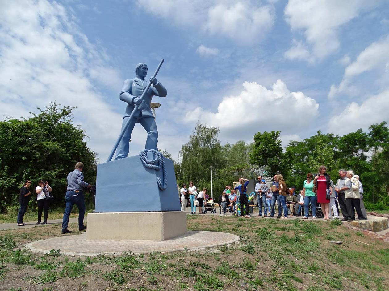 Skulptur eines Fährmanns in Völklingen, geschaffen von CHRISTIAN REMCHEN